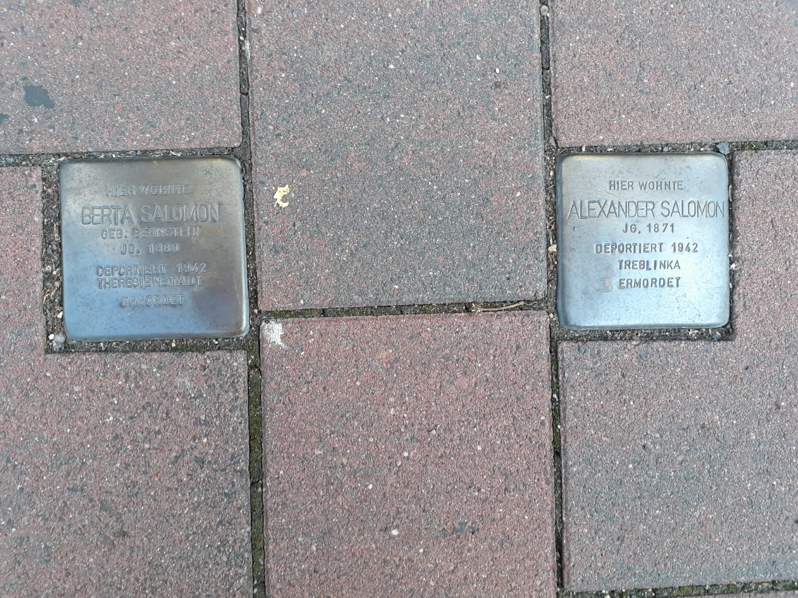 AlexanderSalomon